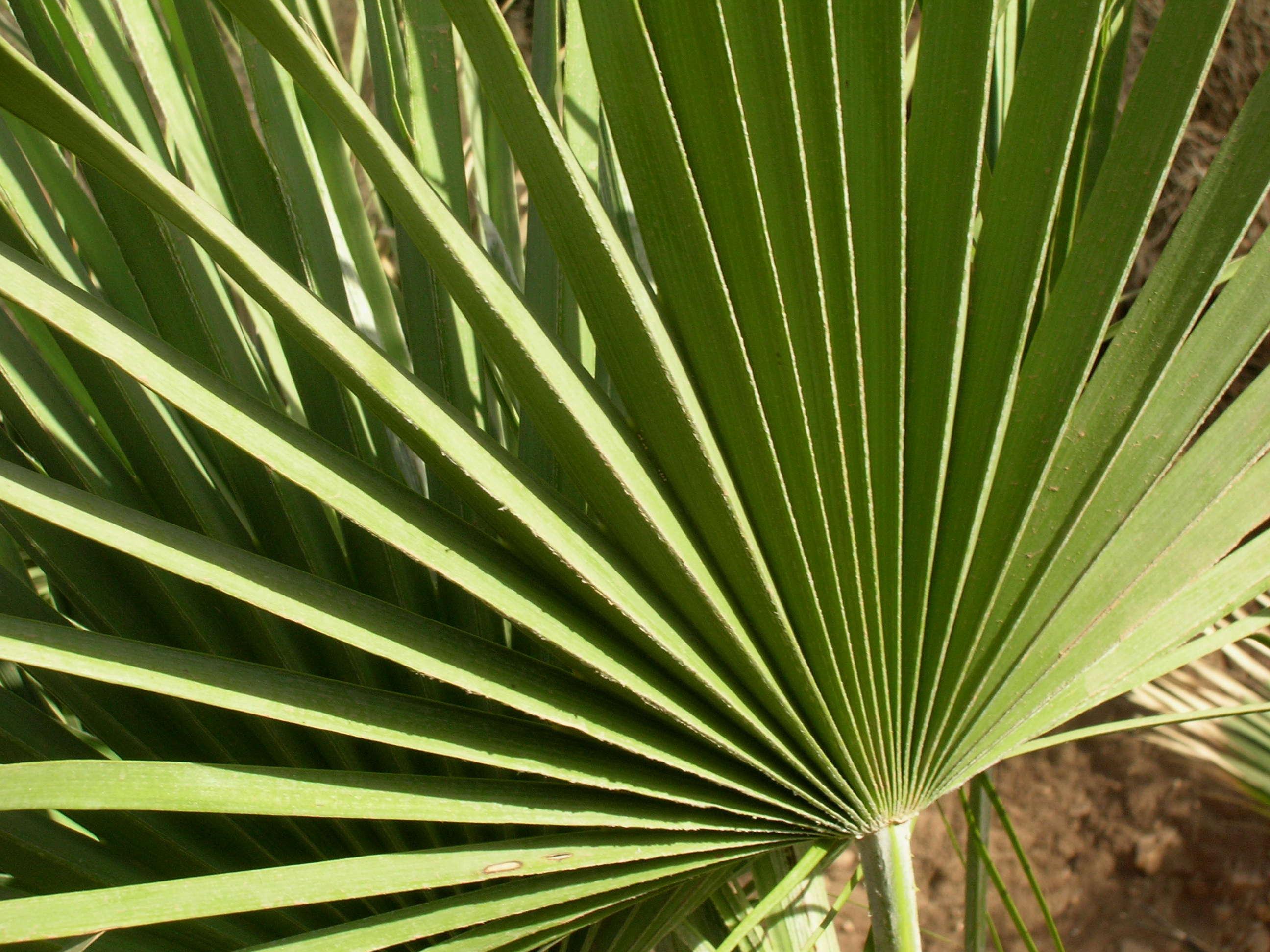 Flore algérienne